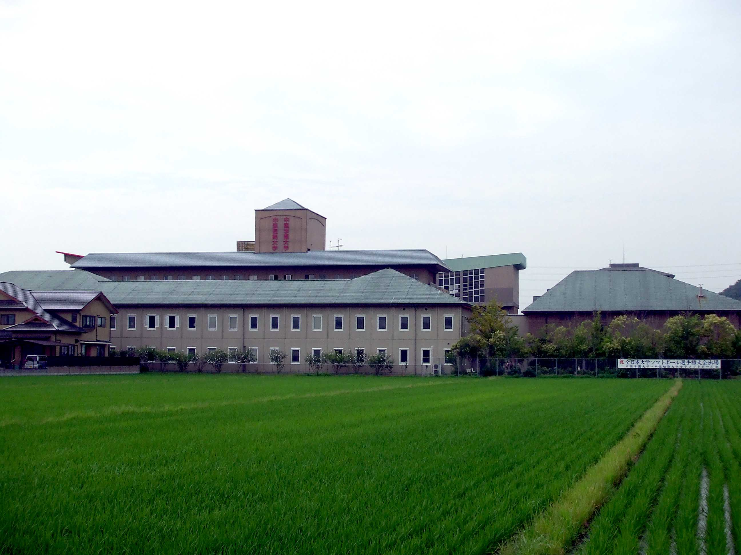 中国学園大学。岡山県岡山市北区庭瀬。2008年7月11日、投稿者本人が撮影。 Category:岡山市の画像